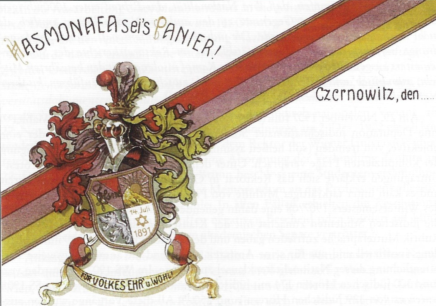 Wappenkarte der J.N.A.V. Hasmonaea Czernowitz